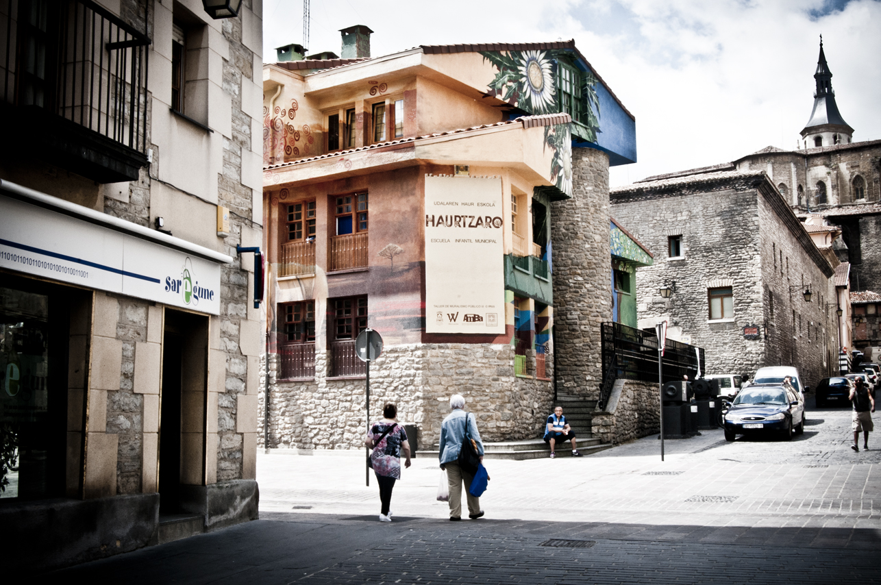 Entrada de Saregune y cantón en el que se ubica